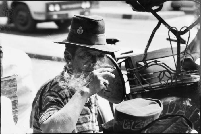 Negatief. Een becakrijder die in de winkelstraat Jalan Malioboro een kretek sigaret rookt